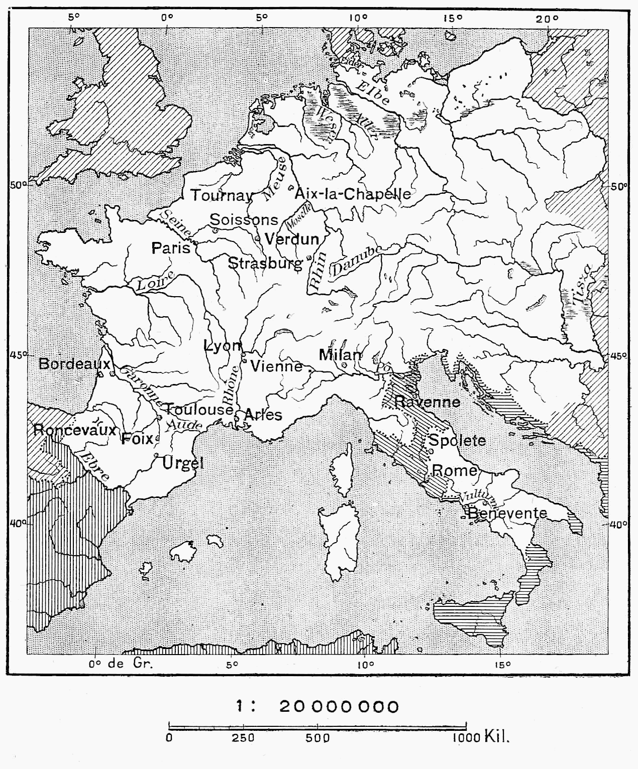 Empire de Charlemagne